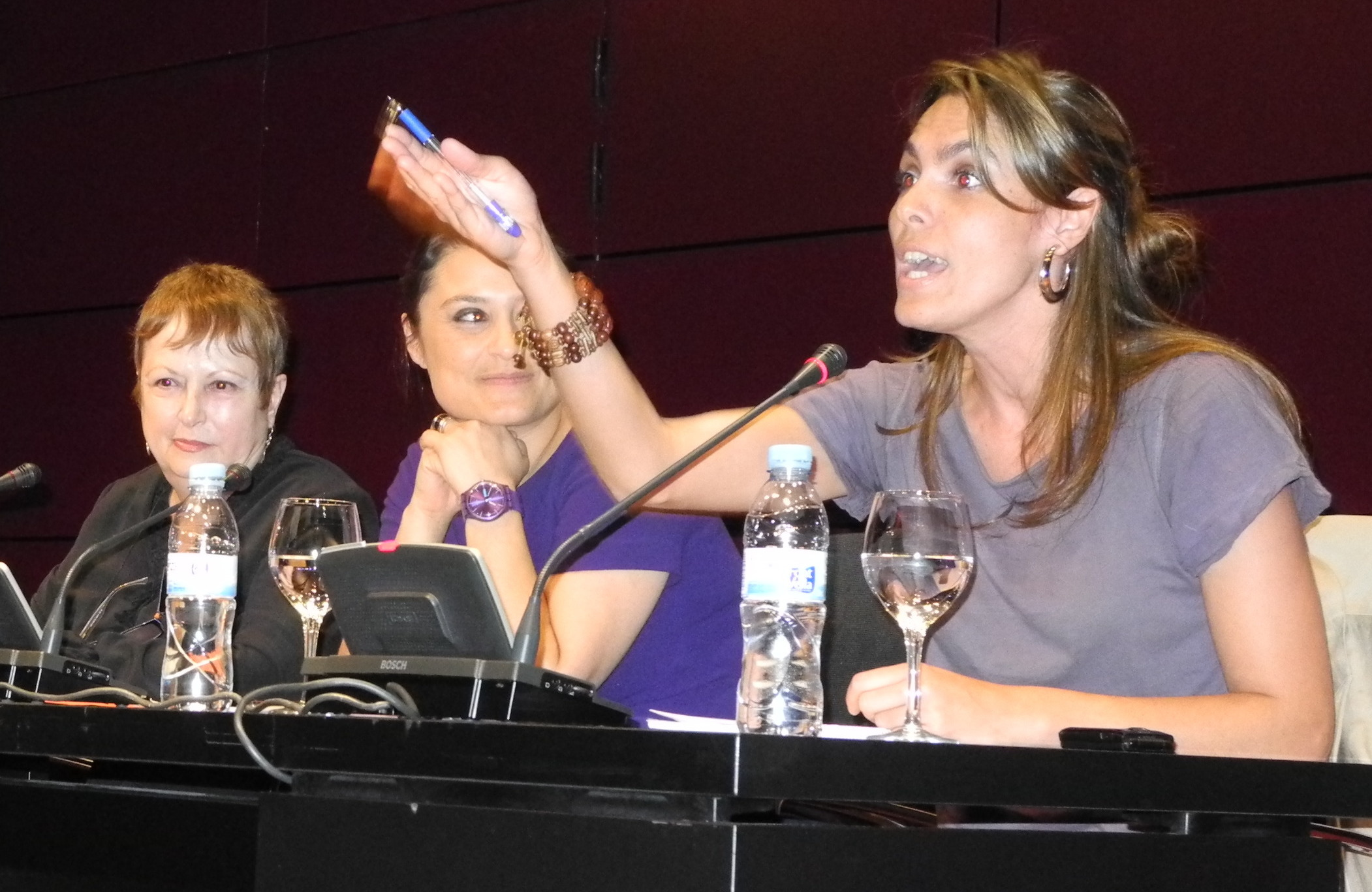 Mesa de apertura de la celebración del 20 aniversario del Curso de Teoría Feminista dirigido por Celia Amorós y Ana de Miguel. Madrid